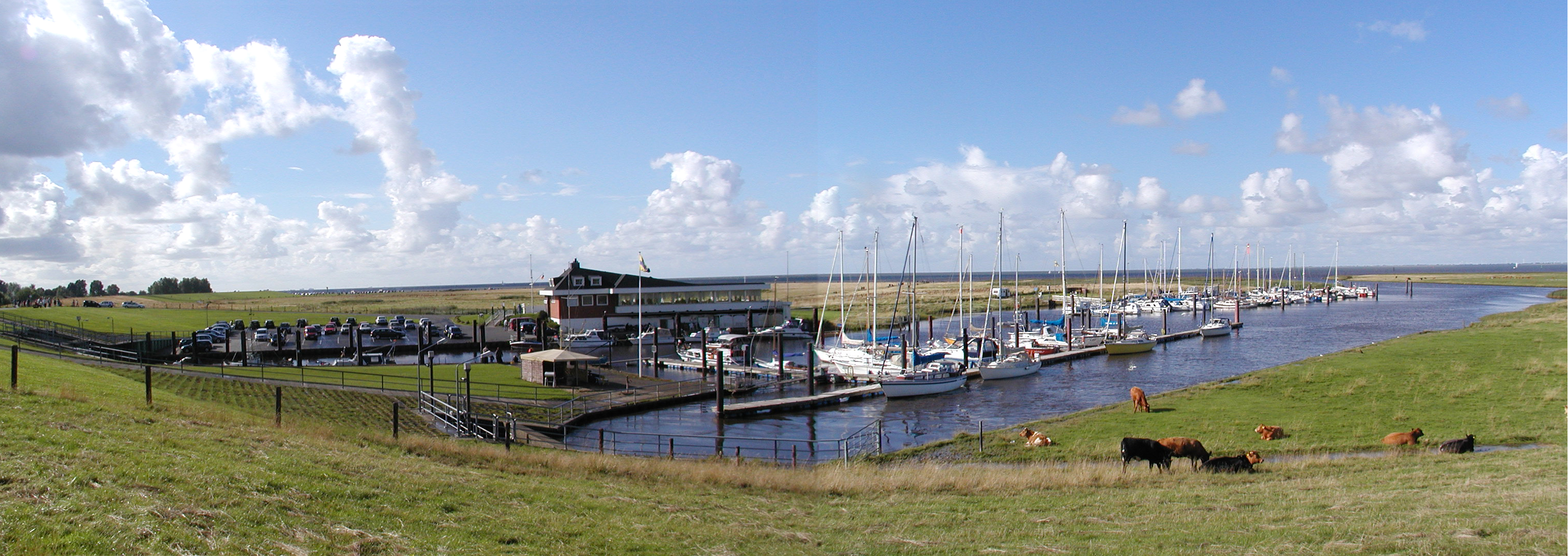 Der kleine Hafen in Otterndorf